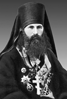 Епископ Владимир (Соколовский-Автономов)